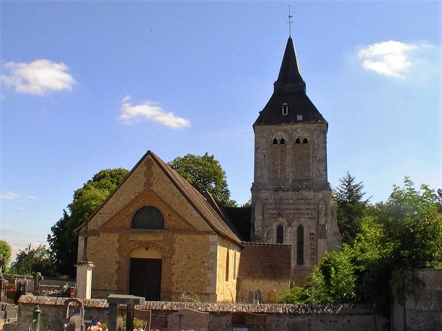 L'église Saint-Valérien.